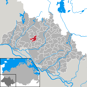 Setzin in Mecklenburg-Vorpommern - district Ludwigslust